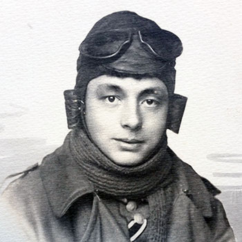 Der Künstler als Flieger